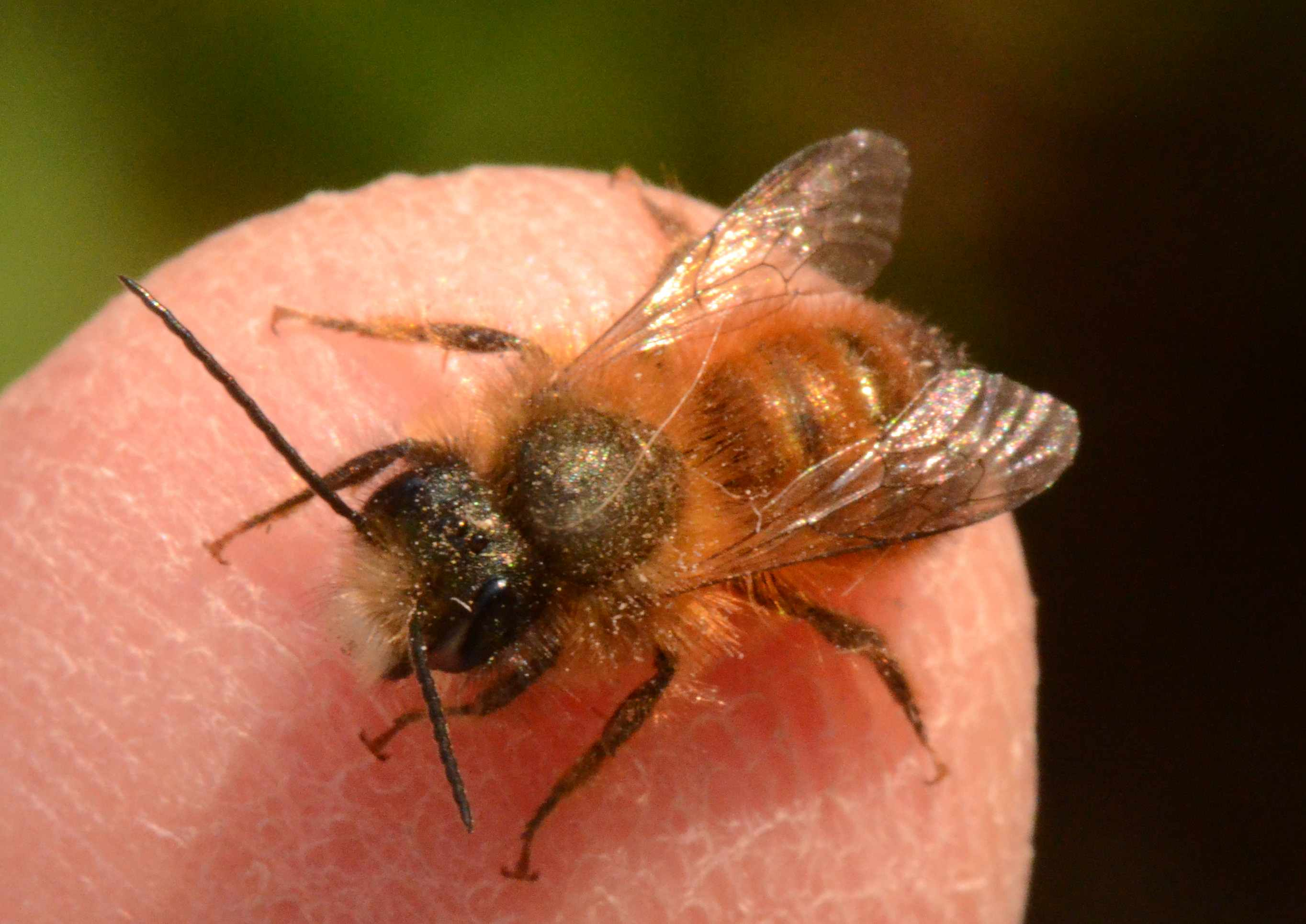 Osmia rufa, mâle, 29/03/2012, Charente, France